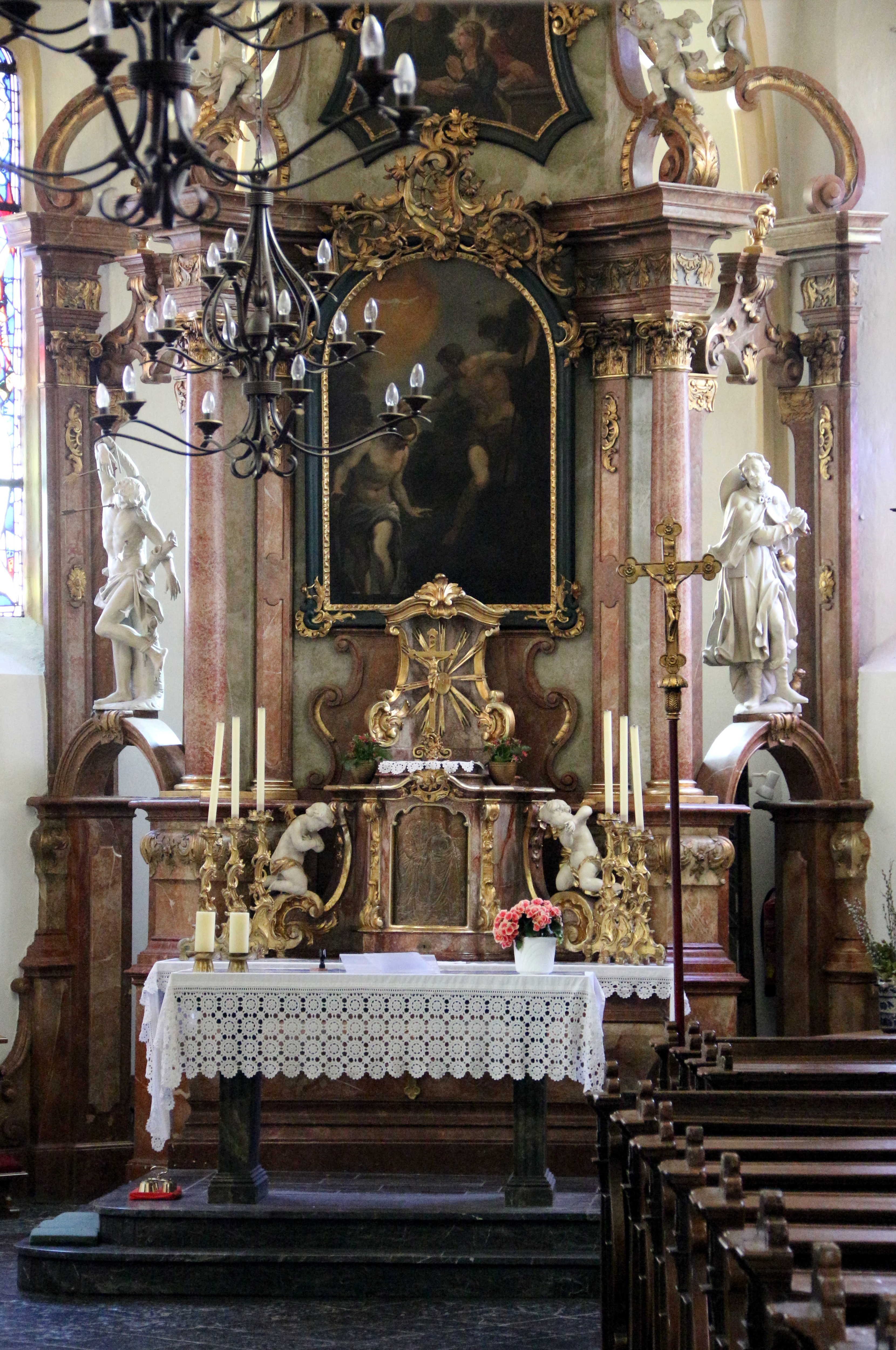 Kath. Pfarrkirche hl. Johannes der Täufer in Gutenstein, Niederösterreich.